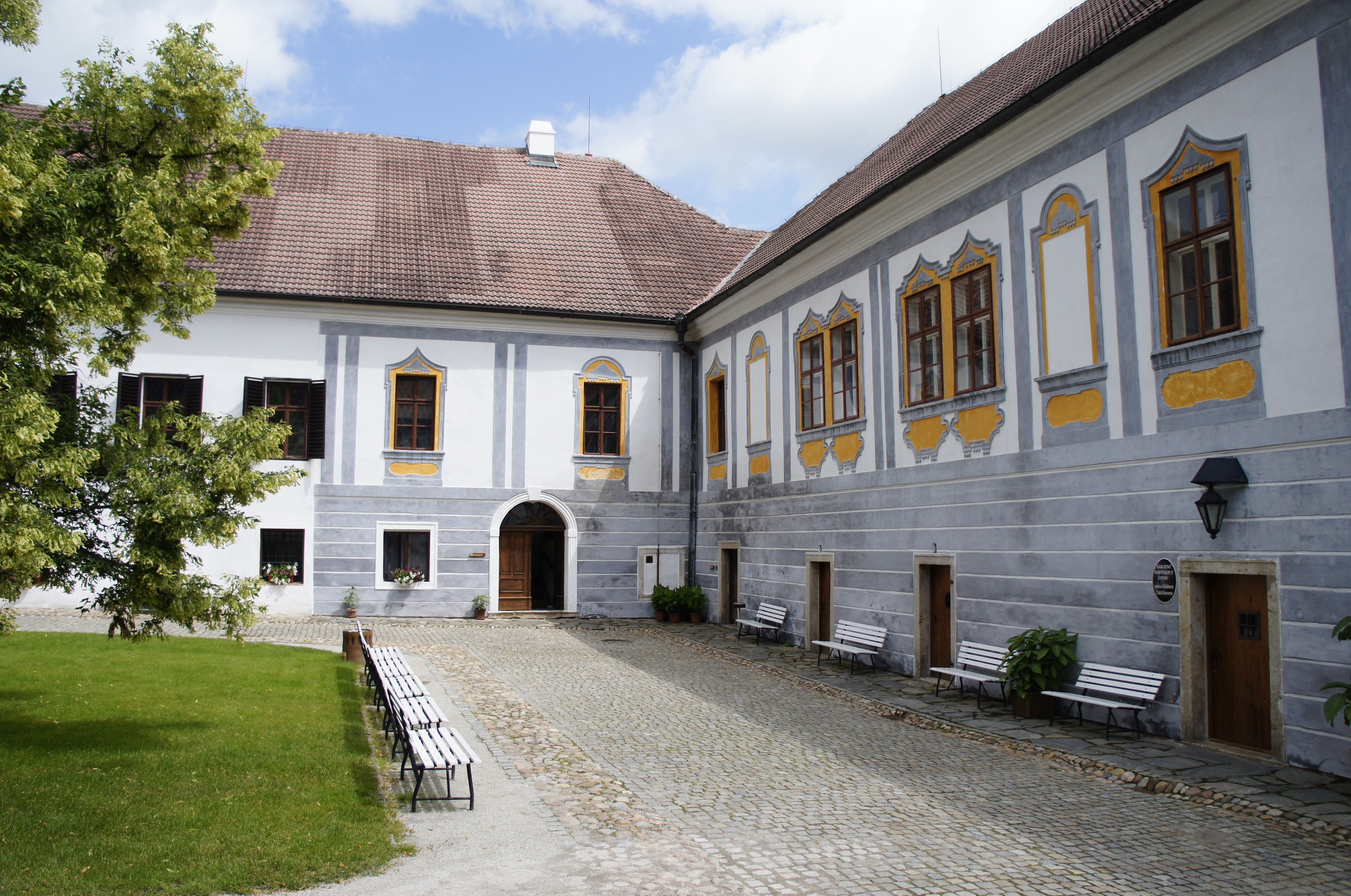 Klášter cisterciáků Zlatá Koruna (Zlatá Koruna), Zlatá Koruna 1